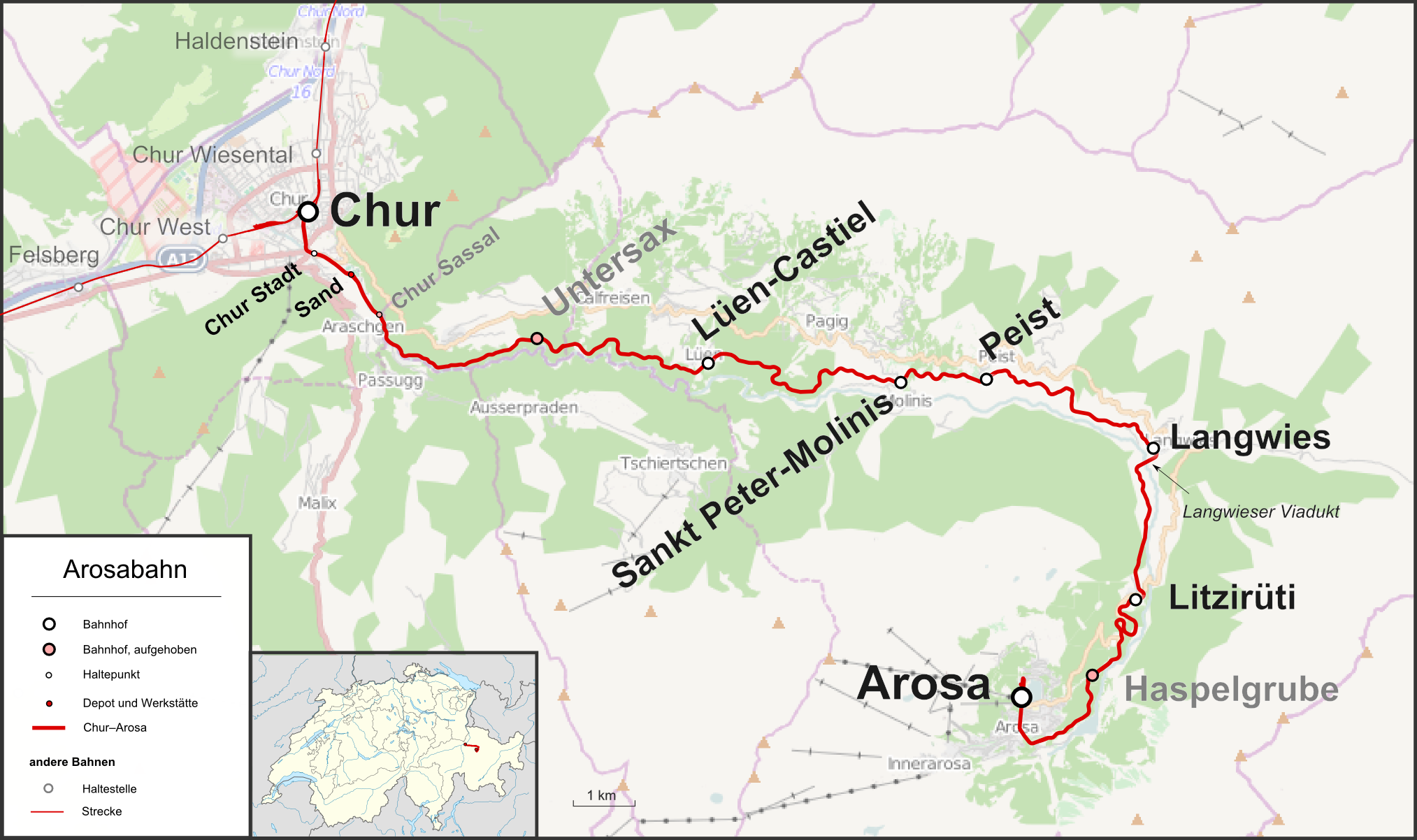 Karte der Arosabahn in der Schweiz